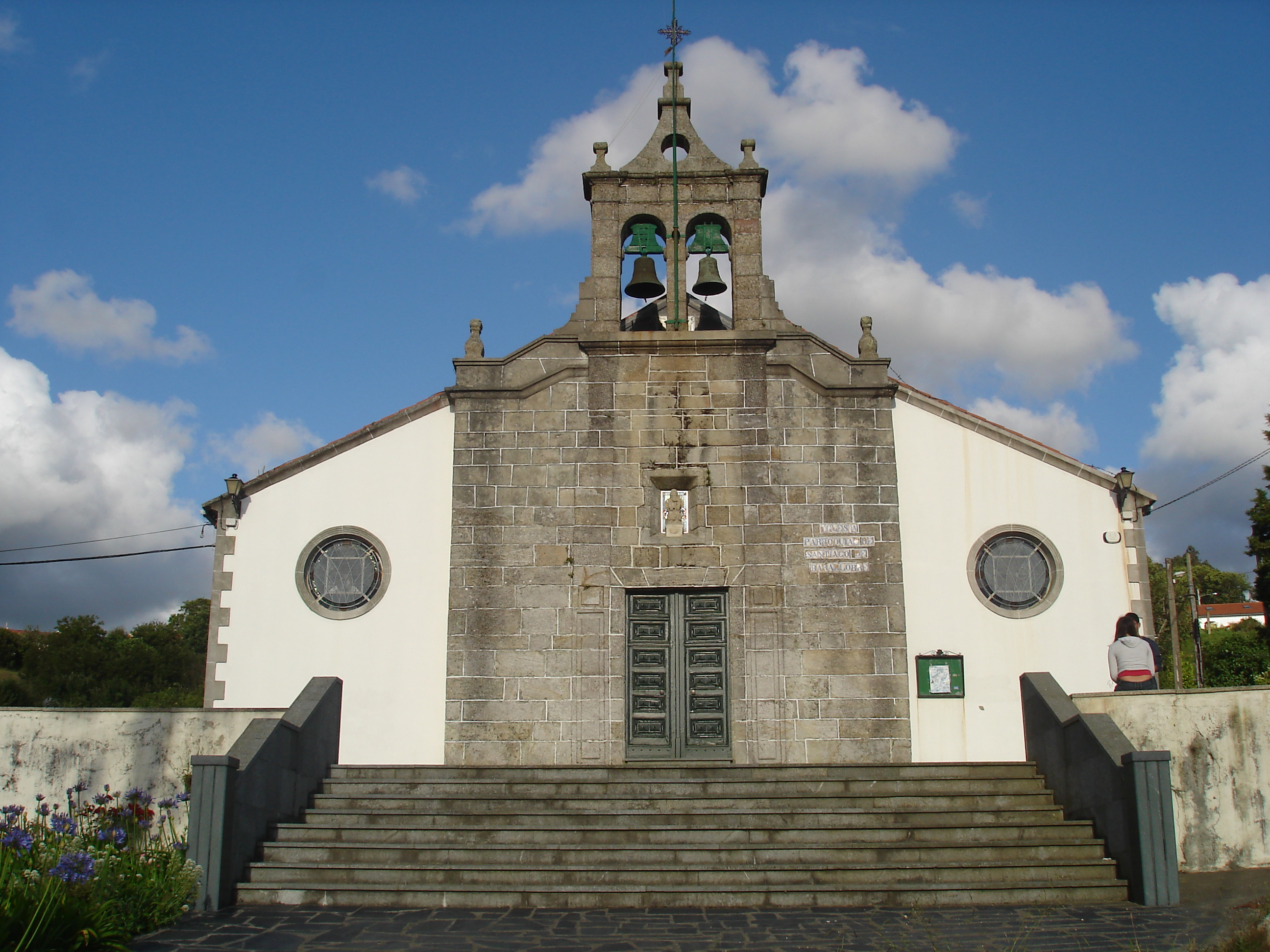 Igrexa de Barallobre (Fene)